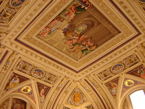 Un cuarto en San Lorenzo El Escorial con unas pocas imágenes detalladas